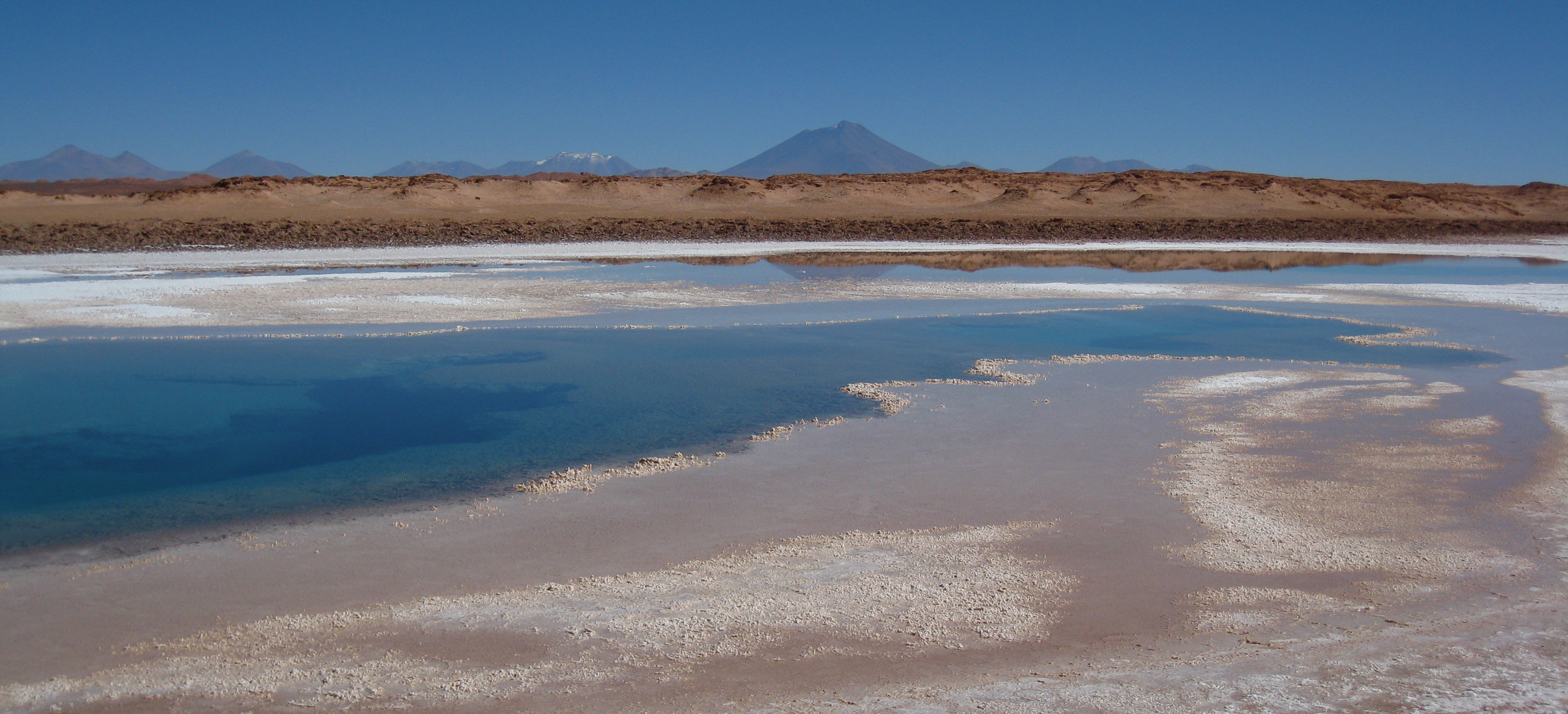 Ojo de mar en Tolar Grande, Salta (Argentina)